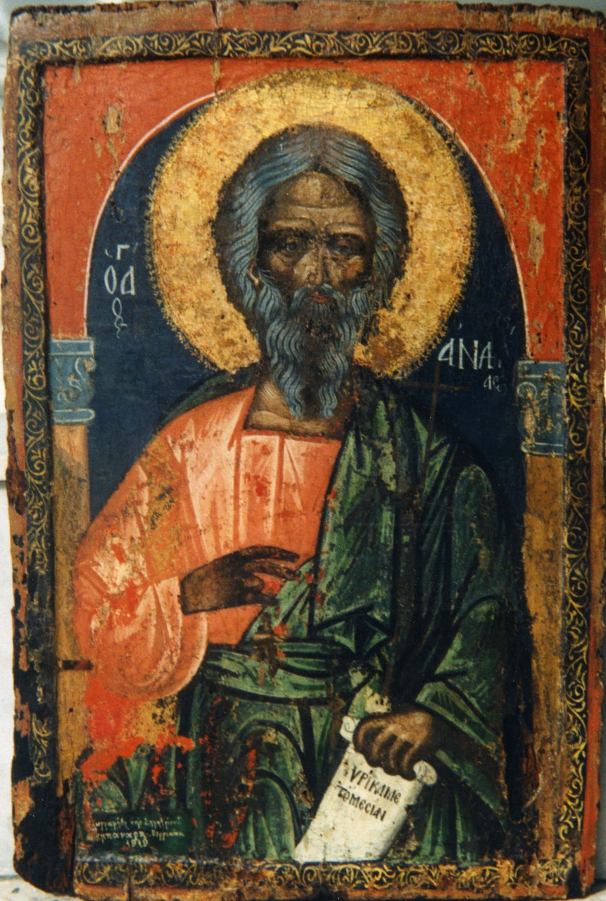 Αμφιπρόσωπη εικόνα με τον Άγιο Γεώργιο και τον Άγιο Ανδρέα Β΄ μισό 12ου αι. - Α΄ μισό 18ου αι. Βέροια, Ιερός ναός Αγίου Ανδρέα